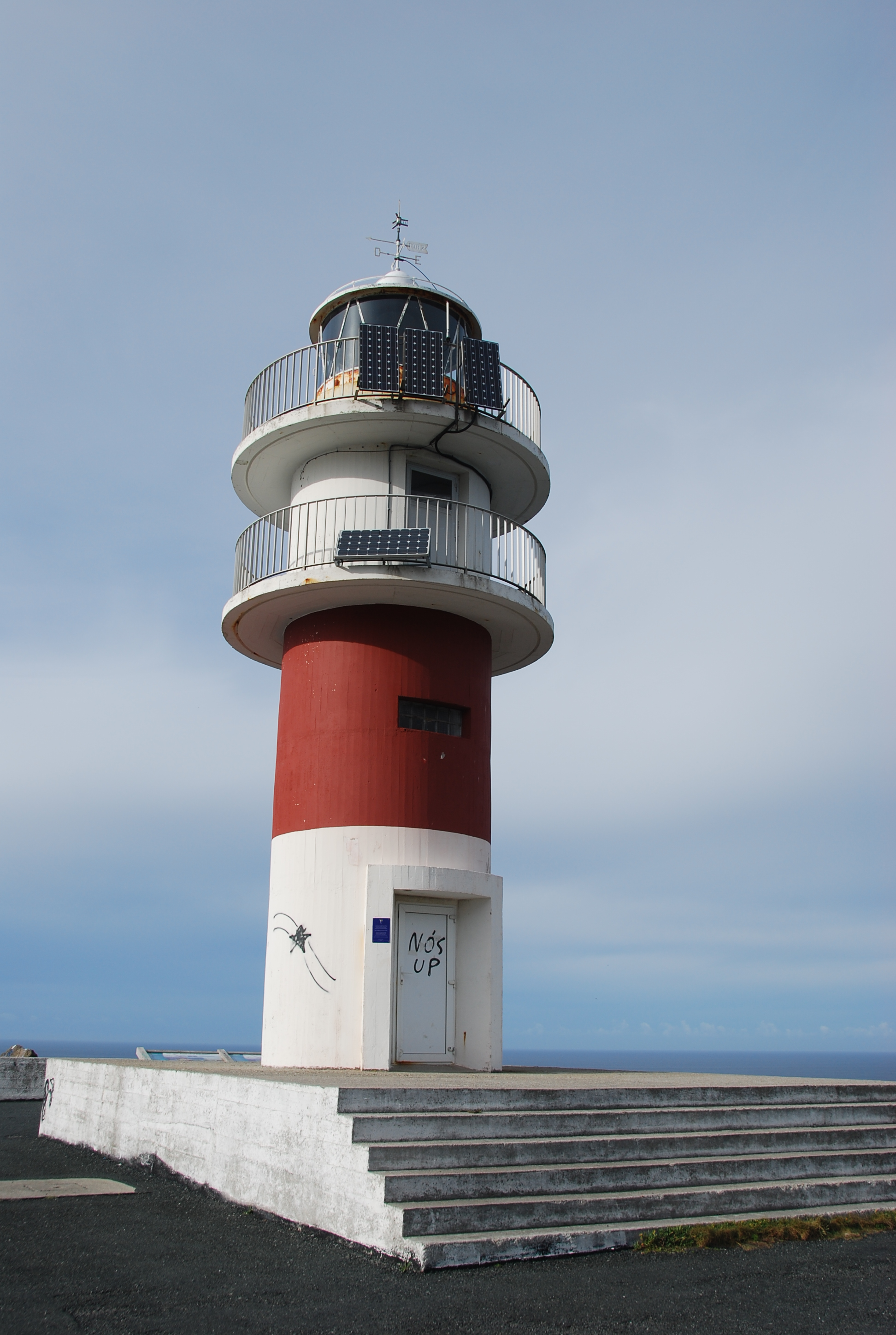 Faro de Cabo Ortegal